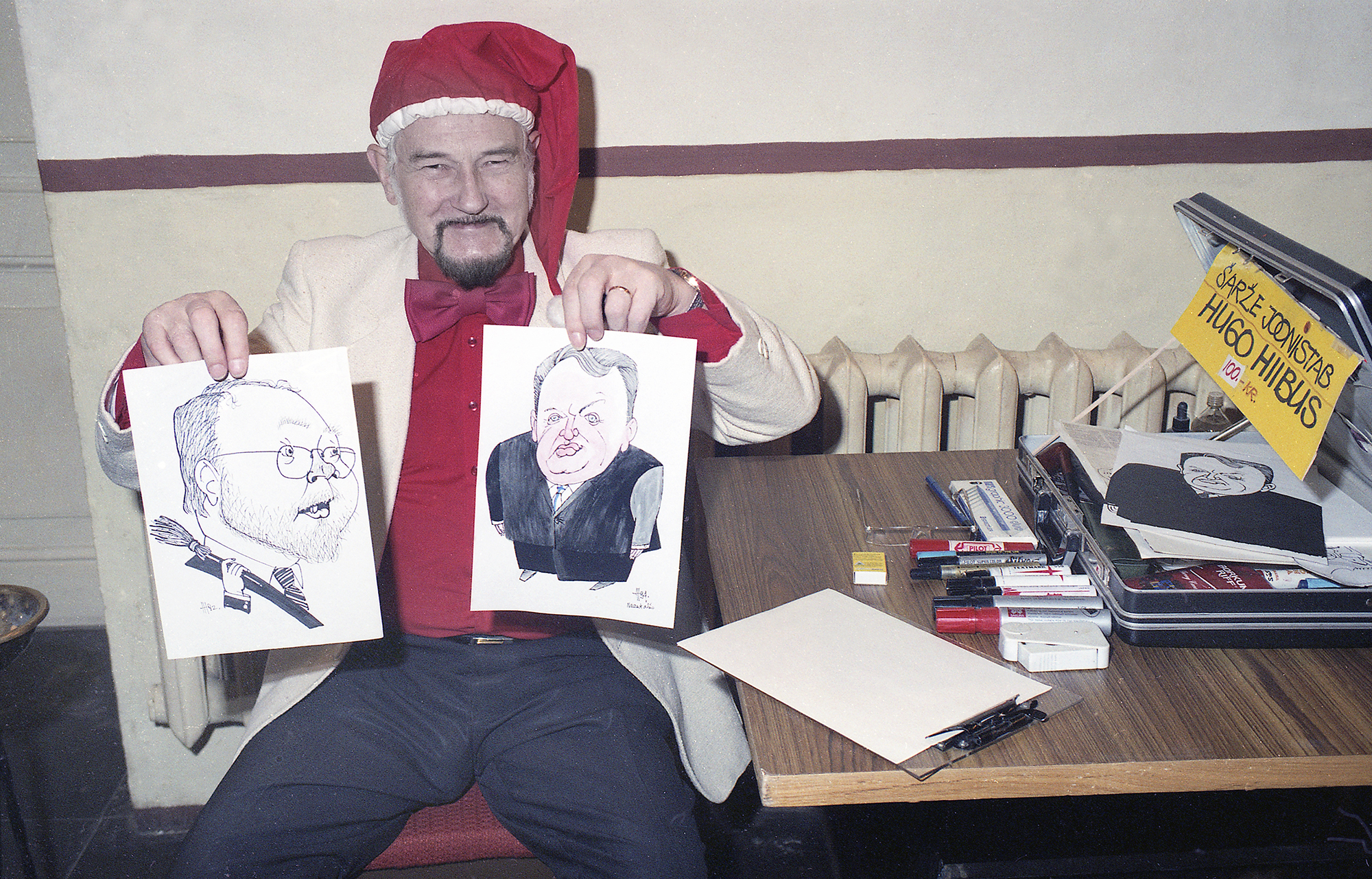 Hugo Hiibus 96